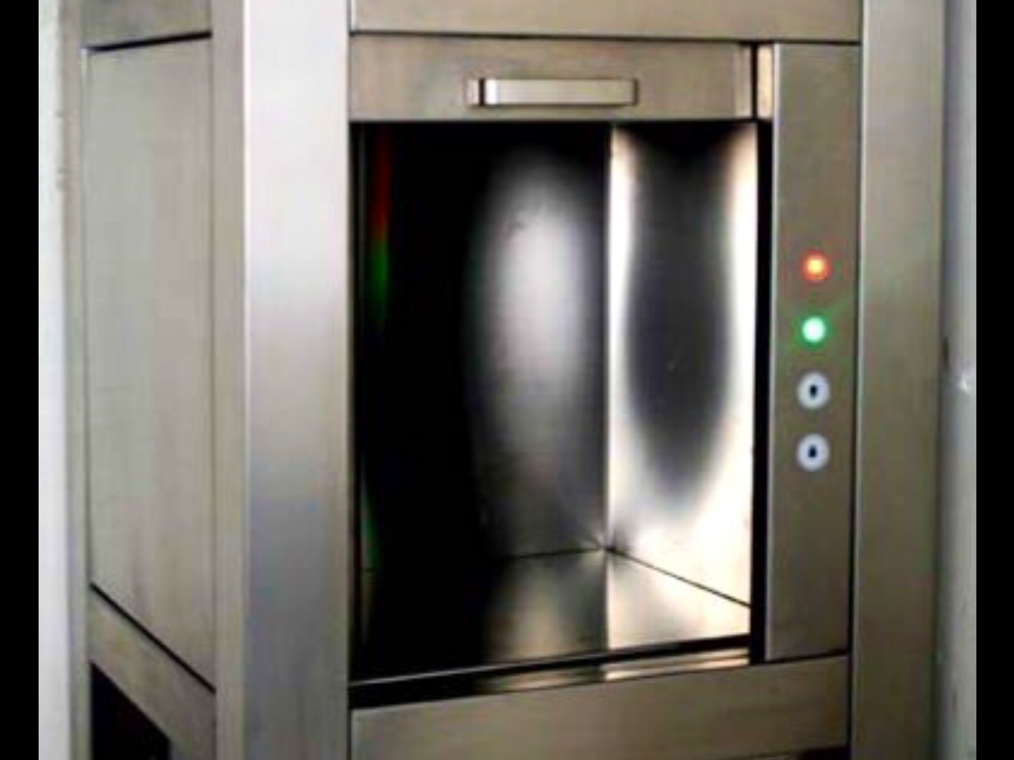 Elevador de Carga - Inovação do Projeto 32. O Elevador de Cargas é ideal para agilizar o transporte de pequenas cargas dentro da Cia Sup Av, o elevador monta-cargas também auxiliara na comunicação entre os pisos do Depósito Climatizado. Este equipamento foi desenvolvido para proporcionar maior comodidade e praticidade ao usuário. O objetivo é atender às necessidades da logística da AvEx, aliando qualidade à tecnologia de ponta. Os principais benefícios são: Rapidez na montagem e instalação. Possibilidade de alteração do número de paradas. Baixo consumo de energia. Baixo nível de ruído. Dispensa casa de máquinas e poço. Porta de cabina guilhotina manual em inox, entre outras.